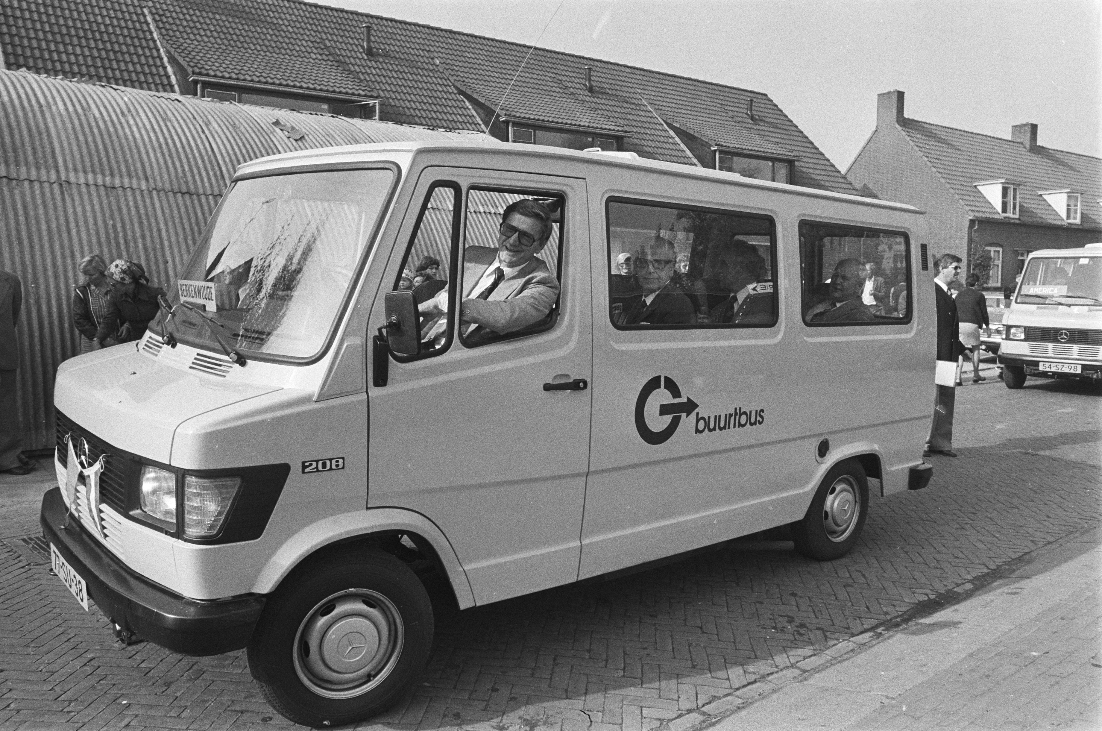 Collectie / Archief : Fotocollectie Anefo Reportage / Serie : [ onbekend ] Beschrijving : Minister Westerterp geeft in Berkwoude startstein voor 1e buurtbus; minister Westerterp bestuurt eerste bus Datum : 27 september 1977 Trefwoorden : bussen Persoonsnaam : Westerterp, Tjerk Fotograaf : Verhoeff, Bert / Anefo Auteursrechthebbende : Nationaal Archief Materiaalsoort : Negatief (zwart/wit) Nummer archiefinventaris : bekijk toegang 2.24.01.05 Bestanddeelnummer : 929-3680